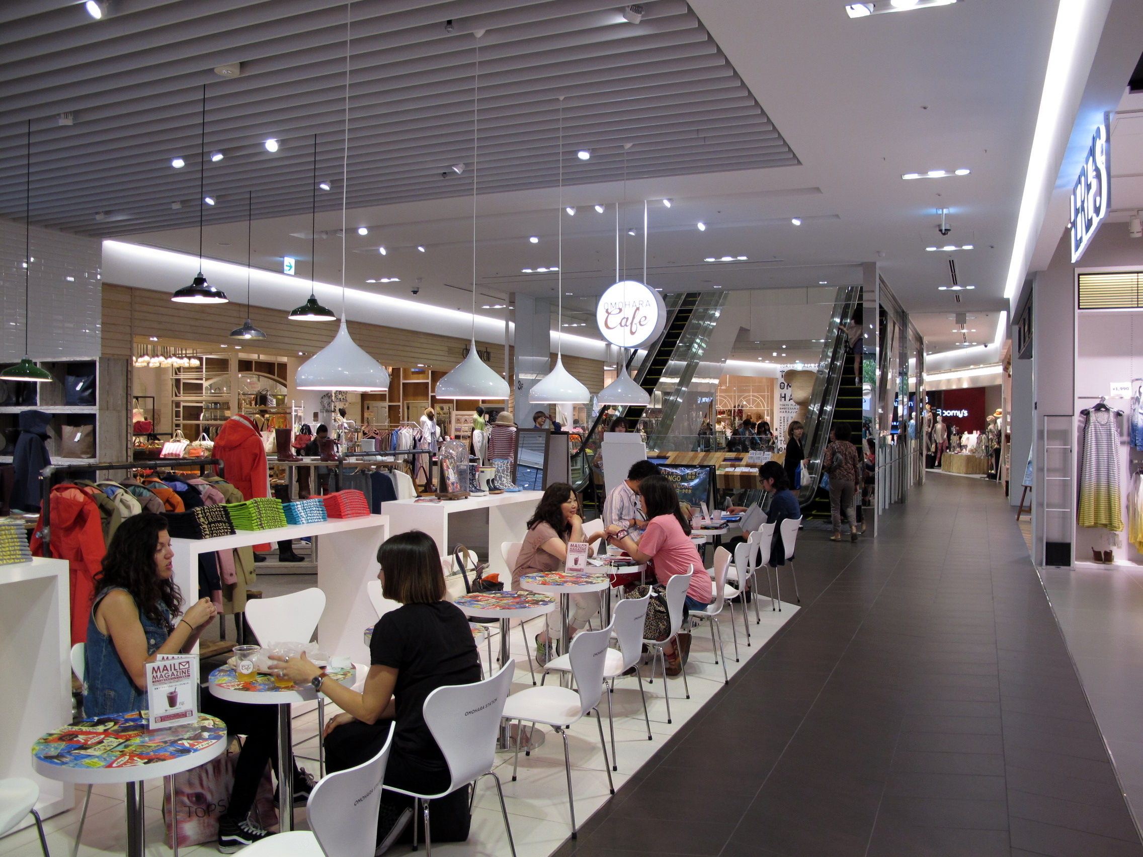 TOKYU PLAZA Level 3